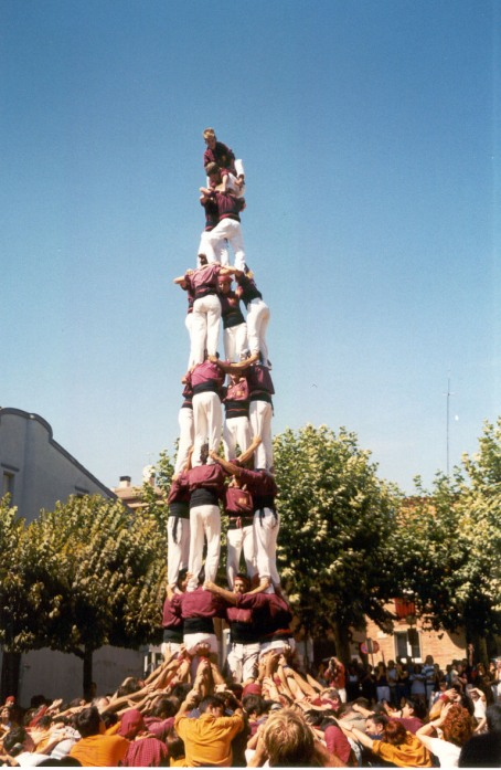 Primer 4 de 8 descarregat pels Xics de Granollers (Llinars del Vallès, 11/09/1996)